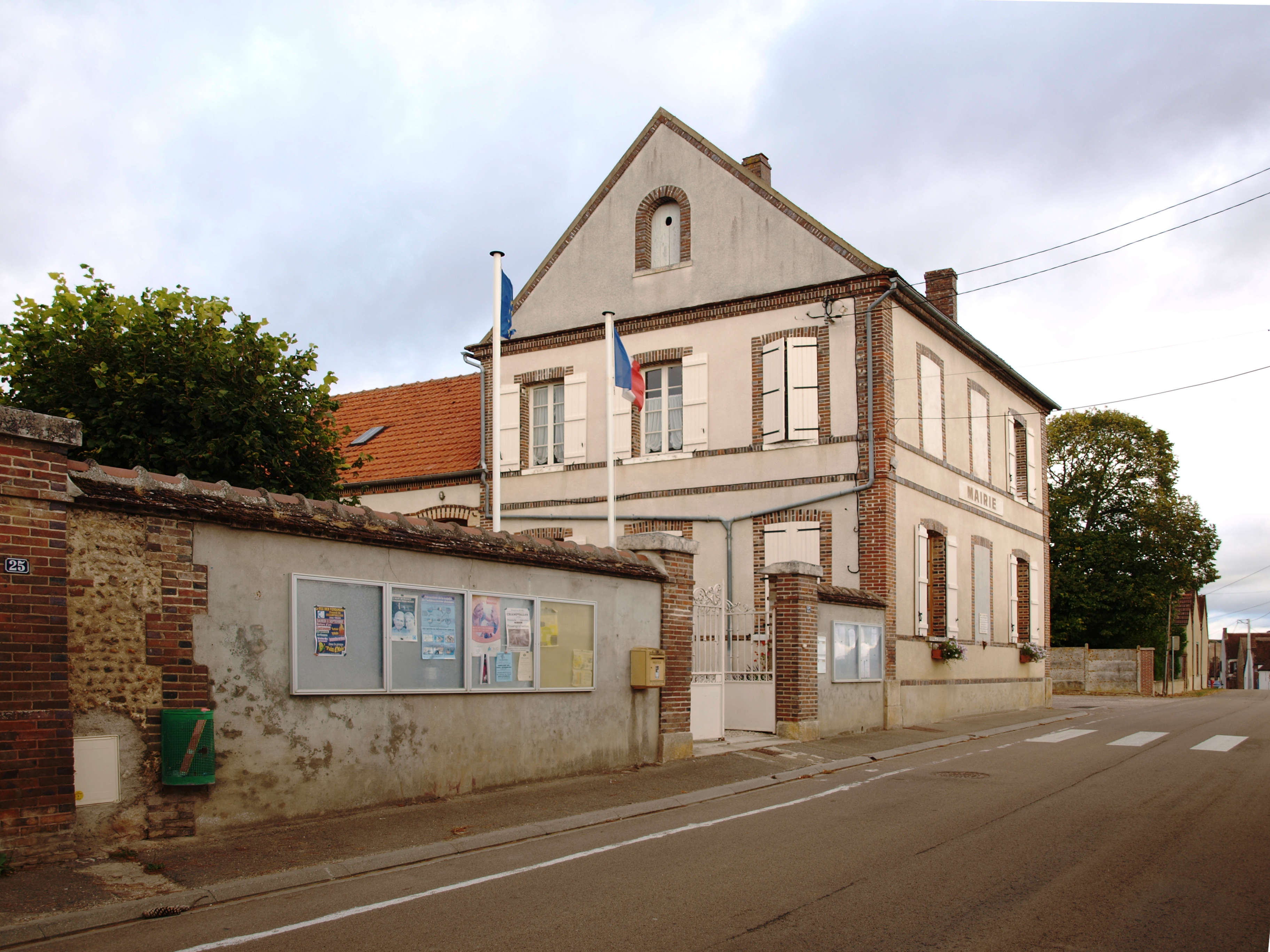 Champvallon (Yonne, France) ; mairie-école.